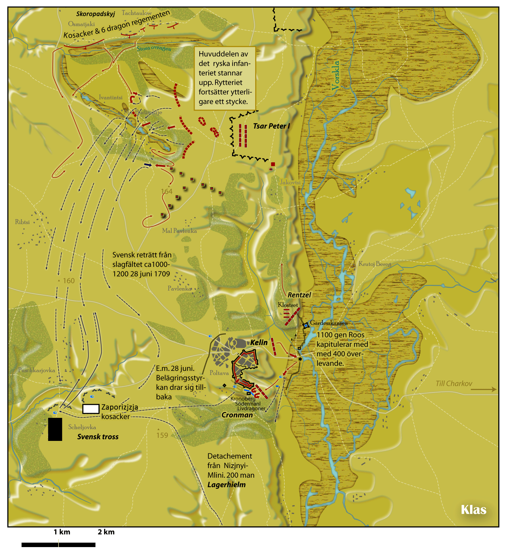 Källa: Karl XII på slagfältet